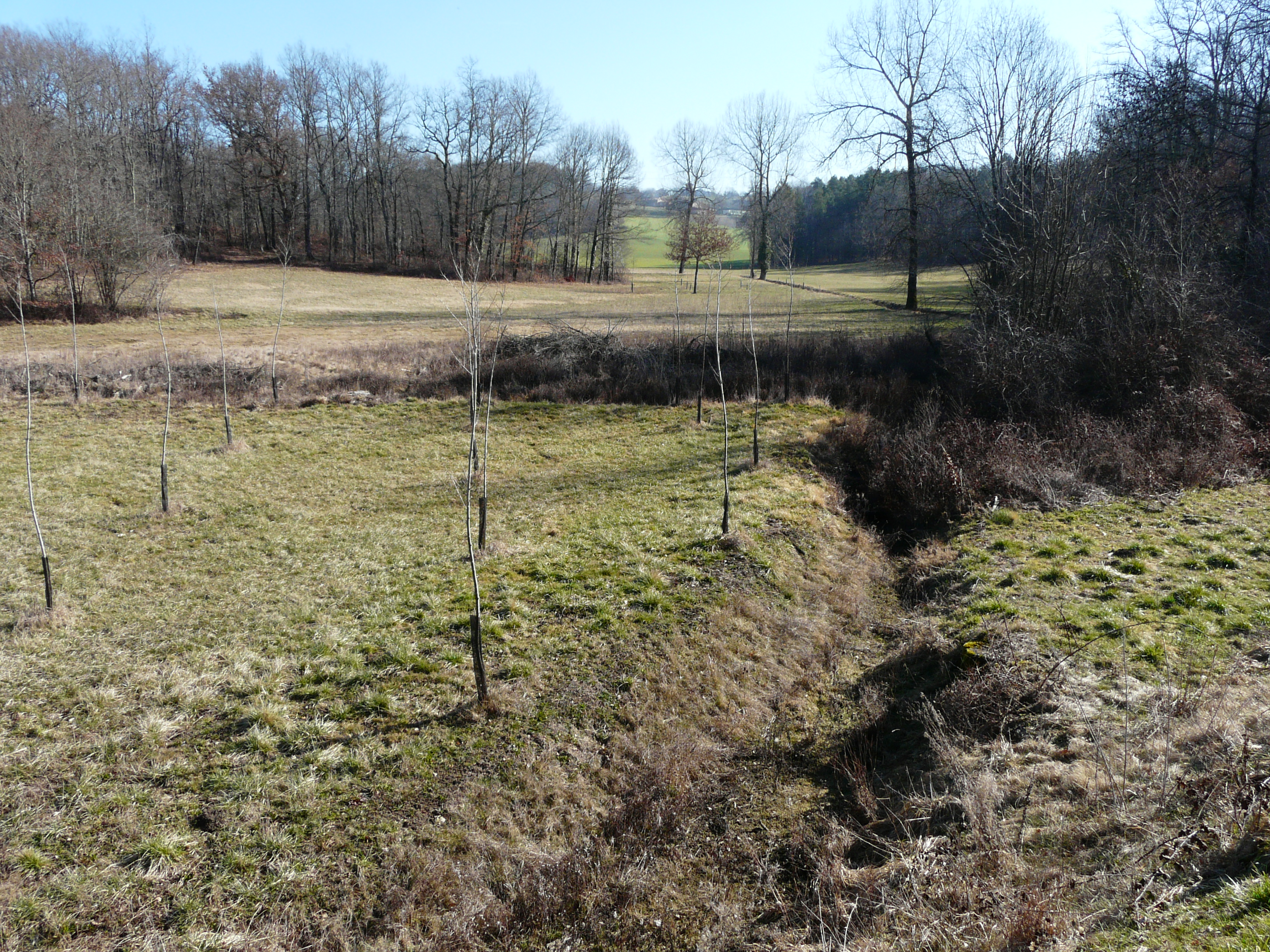 Le Pré Pinson à sec en amont de la route départementale 939, Cantillac, Dordogne, France.